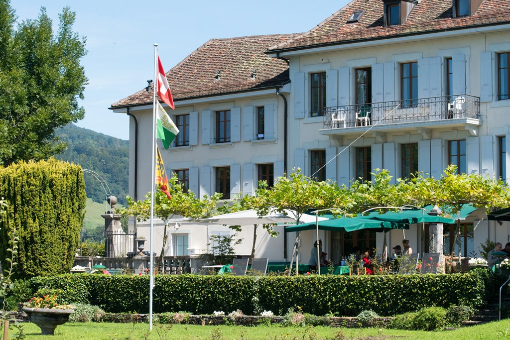 Profiter d’un cadre idyllique pour se ressourcer ou élargir ses horizons et développer ses compétences ? Chacun décidera. Nous sommes attentifs au respect du rythme individuel et vous souhaitons beaucoup de belles rencontres !